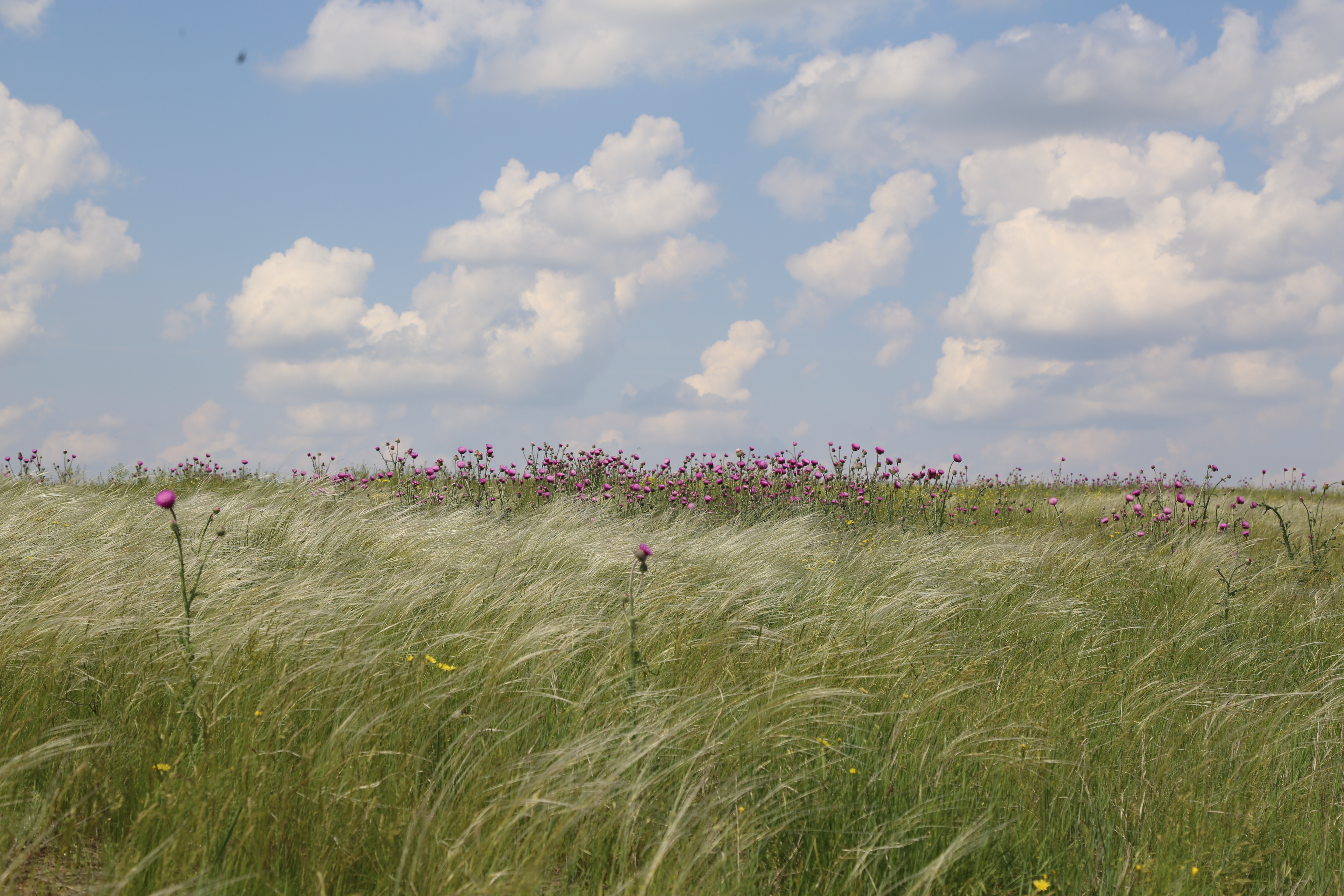 Ростовский заповедник: в центральной части Кума-Манычской впадины, к северу от оз. Маныч-Гудило, в Орловском и Ремонтнеском районах Ростовской области,Орловский район, Ростовская область This image is related to the protected area of Russia number 6100108